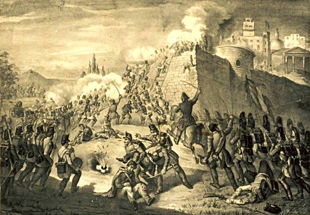 "Assalto delle truppe francesi a Roma nel 1849", ridotto e ritoccato, litografia